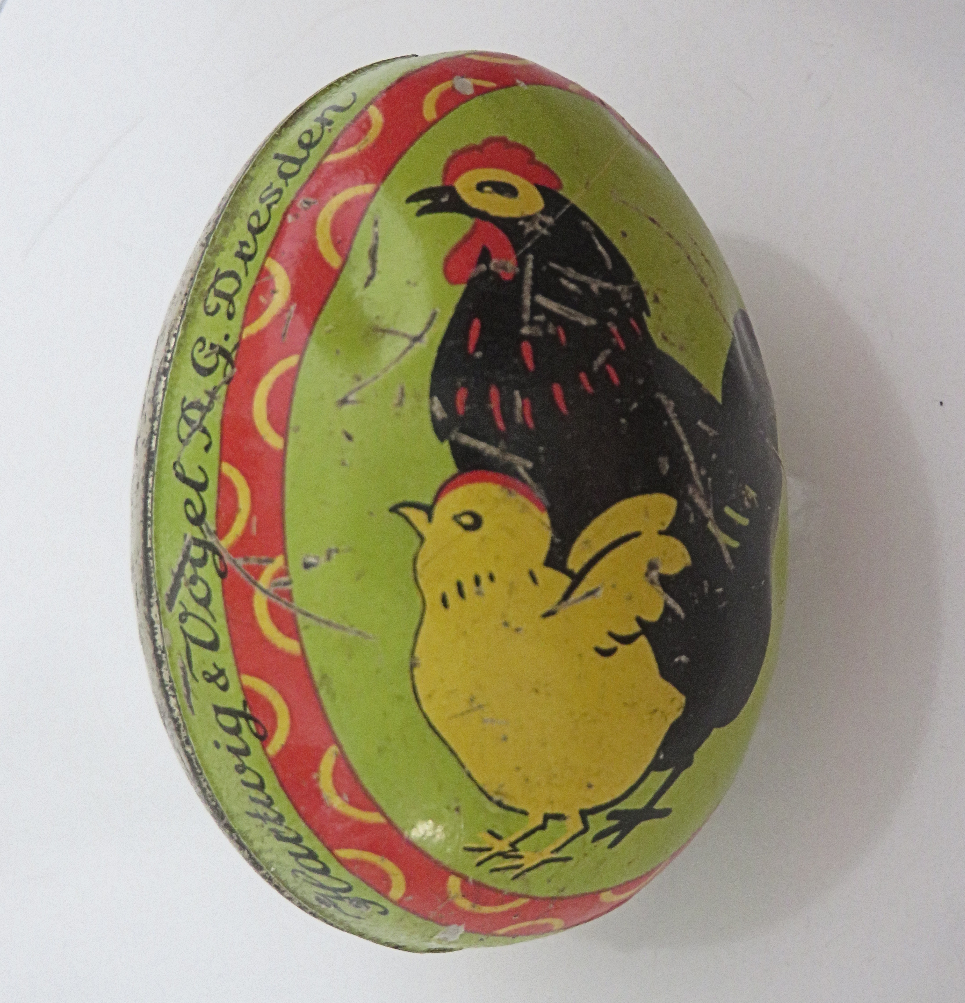 Blechei / Verpackung für Schokolade der Hartwig & Vogel AG, Dresden (vermutlich um 1940)